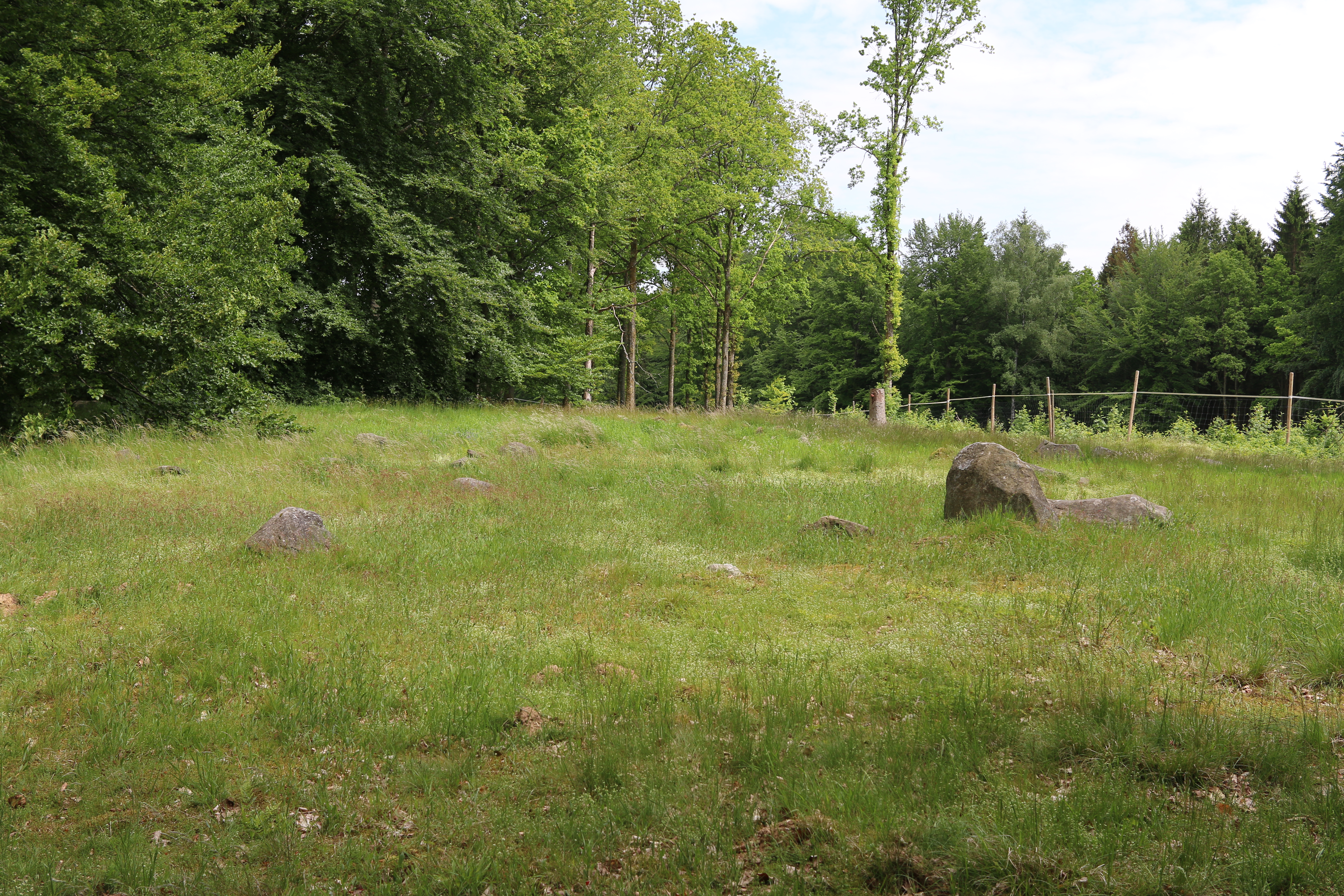 Fulltofta 20:1